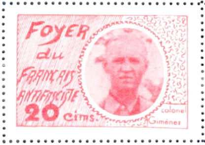 Vinyeta de 20 cts. Imatge: Cara del Coronel Giménez. Color: vermell